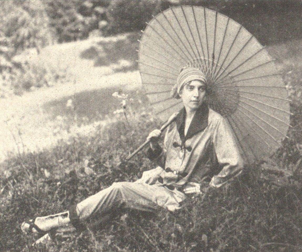 Lo Hesse